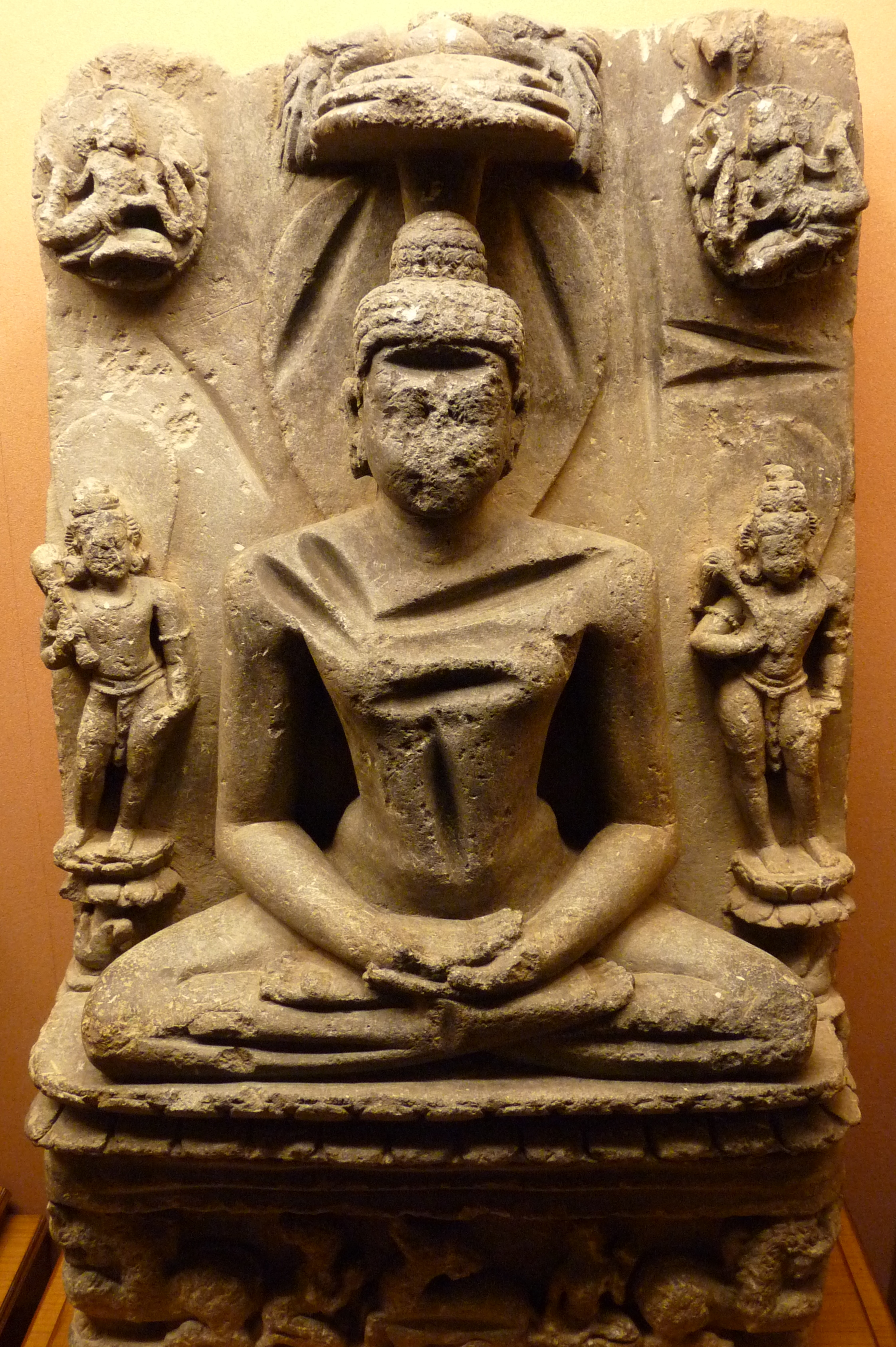 Buddha statue, Orissa State Museum, Bhubaneswar